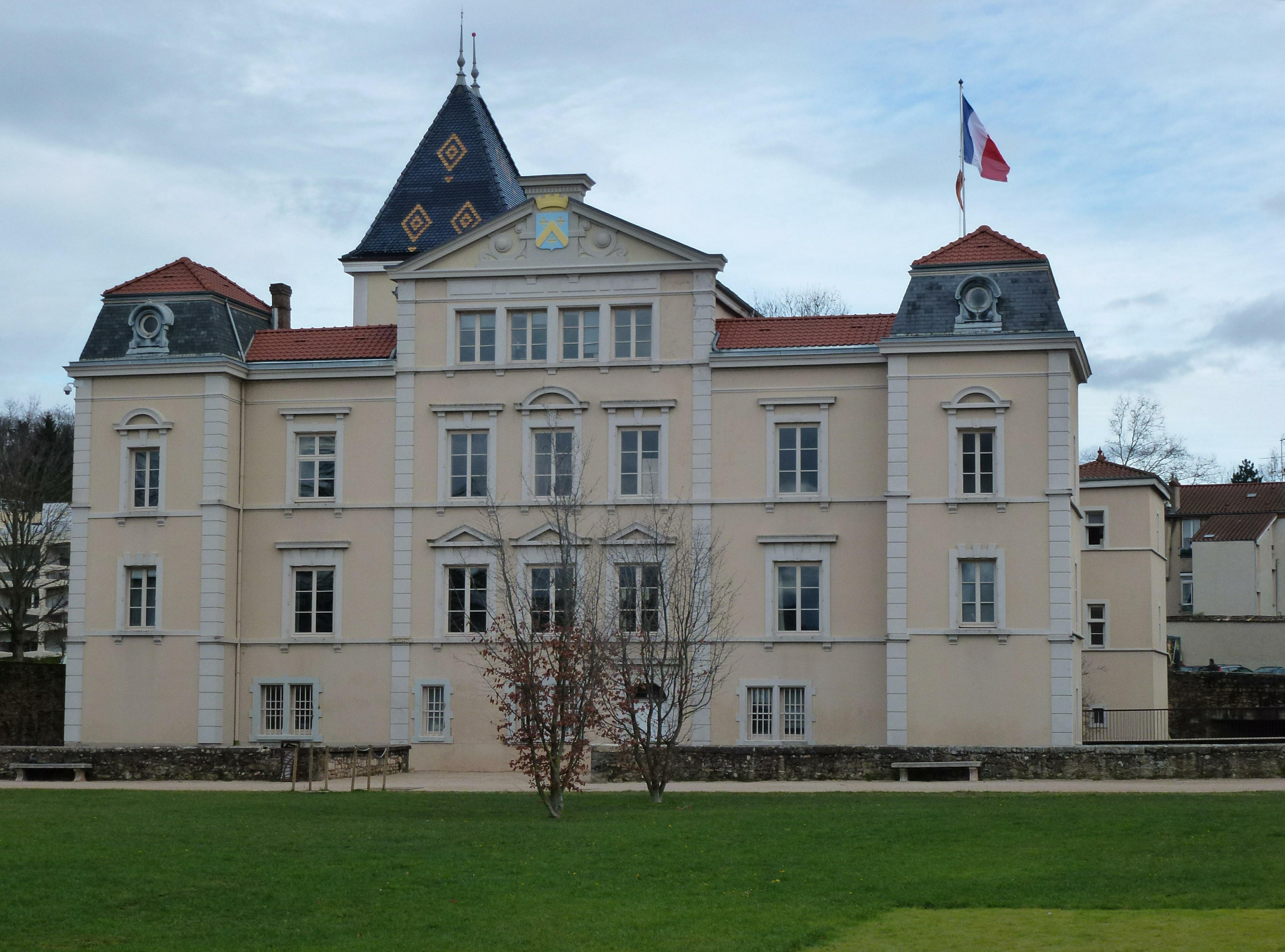 Façade occidentale du château d'Ombreval à Neuville-sur-Saône dans le Rhône